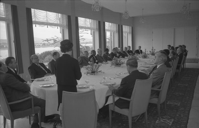 Besuch des Außenministers von Gabun, Jean Hilaire; Empfang Bundesminister Scheel im Hotel Königshof Bonn